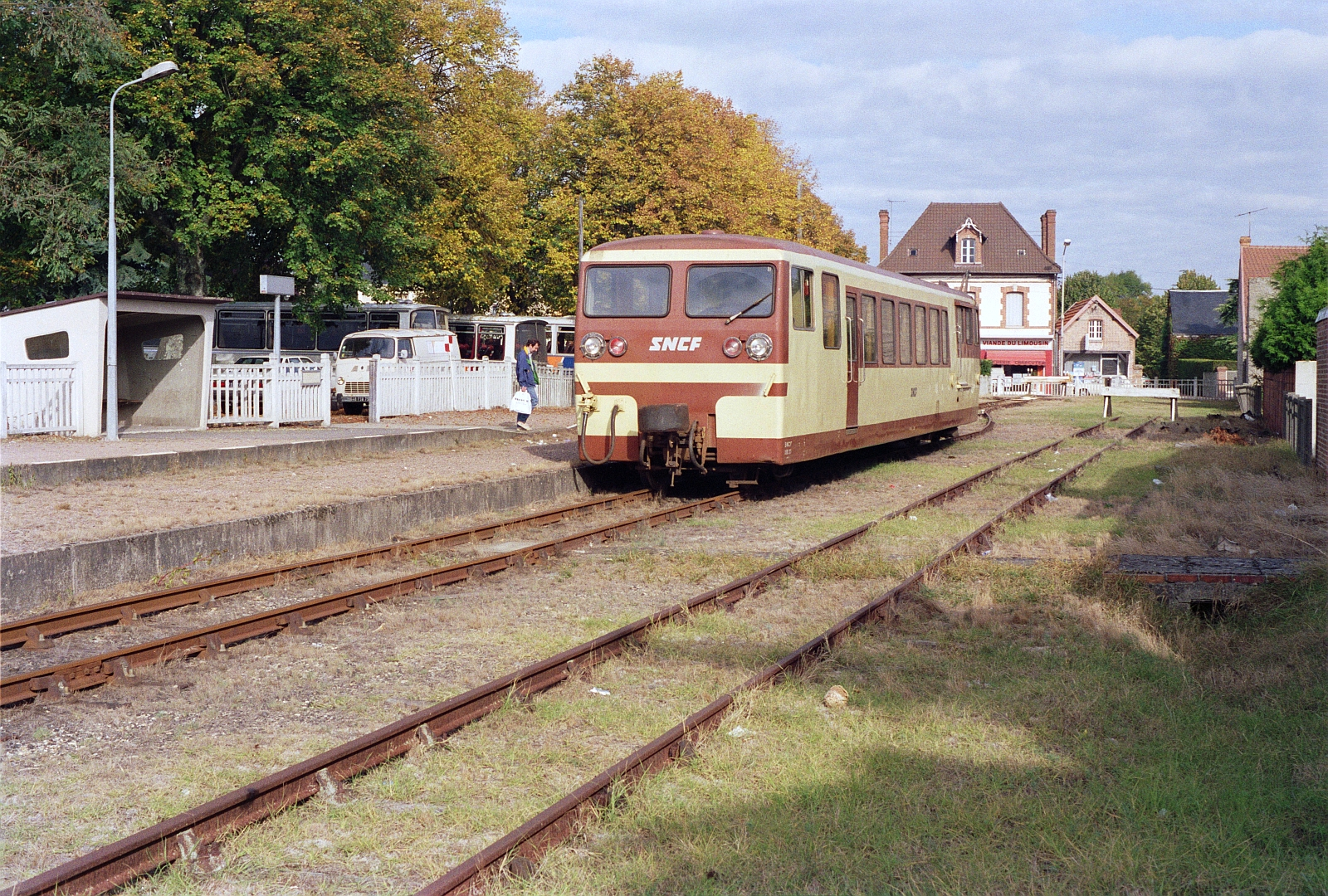 L'autorail X 213 stationne à l'ancien terminus de Salbris BA le 14 octobre 1989.